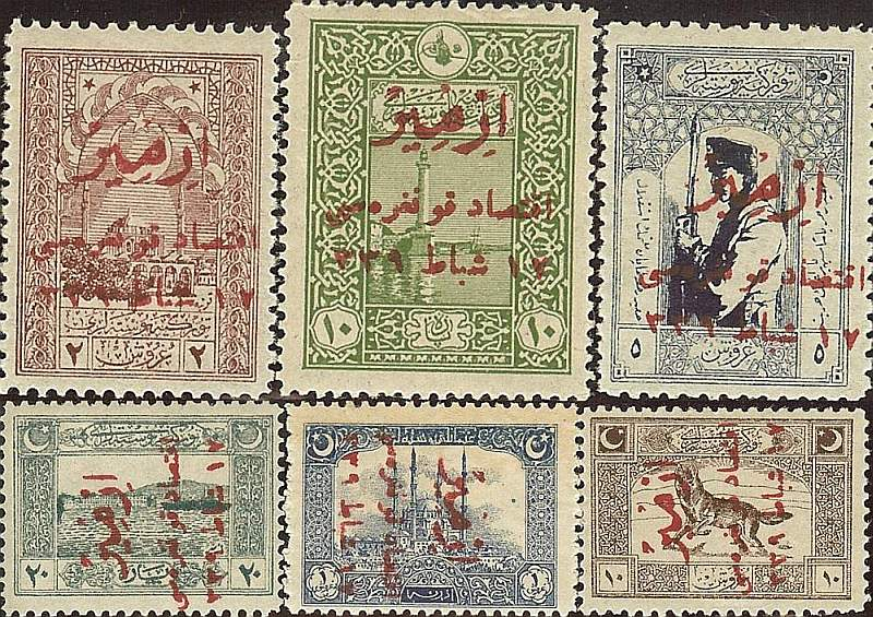 1923 İzmir İktisat Kongresi Hatıra baskılı Pulları (Overprint).